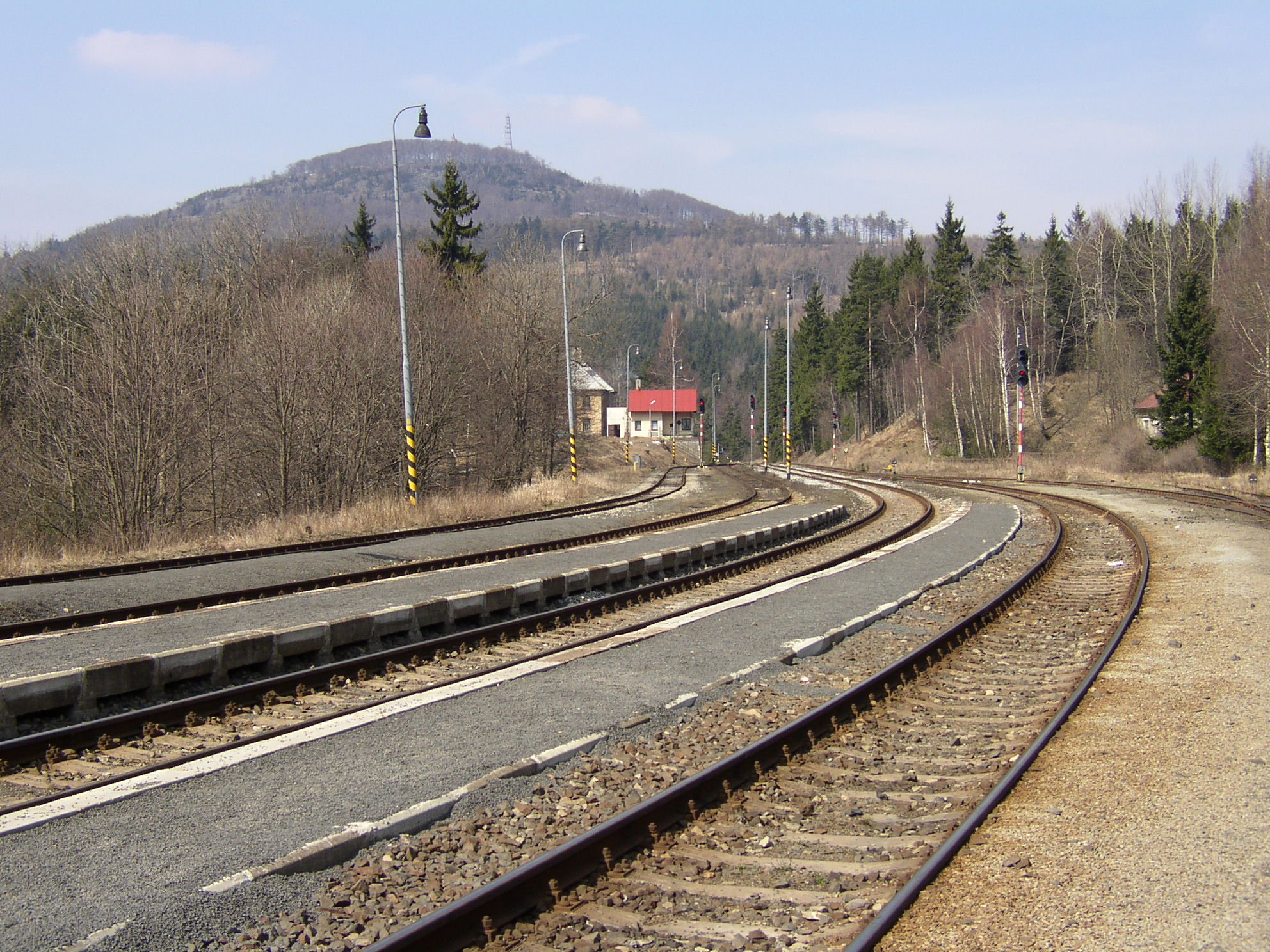 Pohled z jedlovského nádraží na Jedlovou ,Česká republika